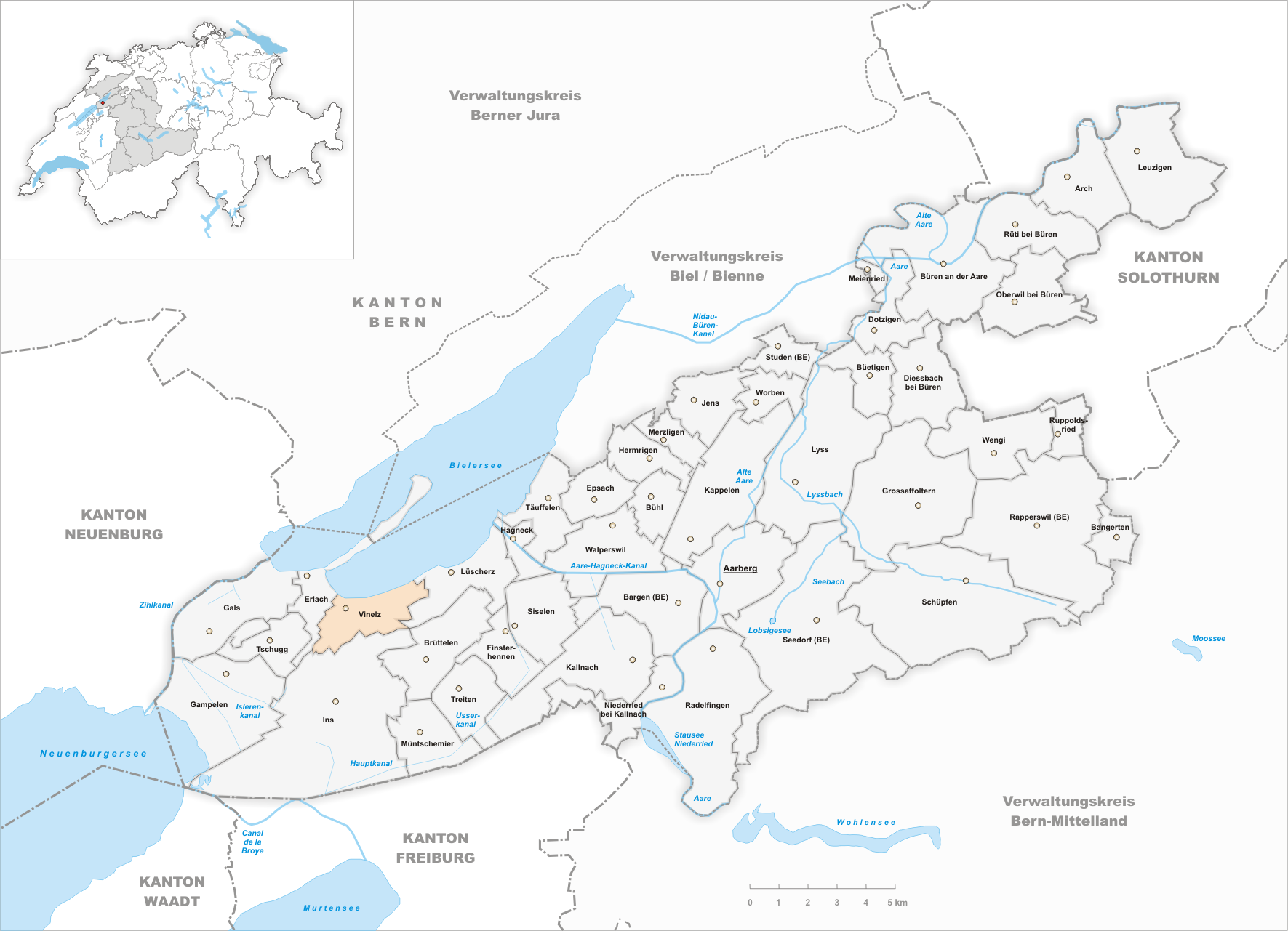 Municipality Vinelz